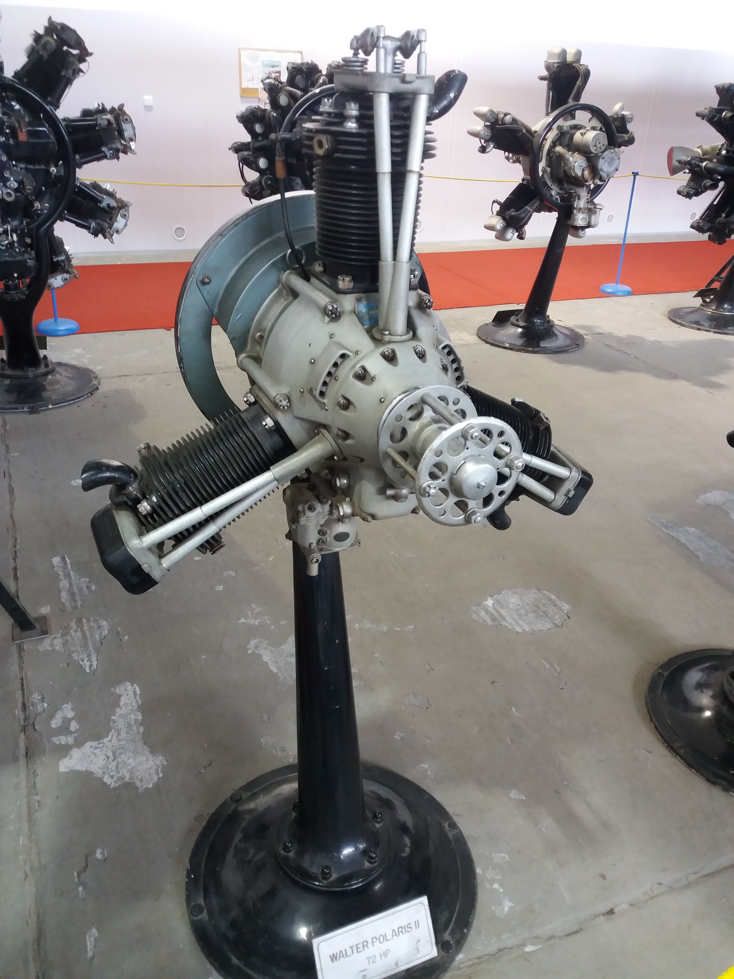 Walter Polaris II (Kbely 2)